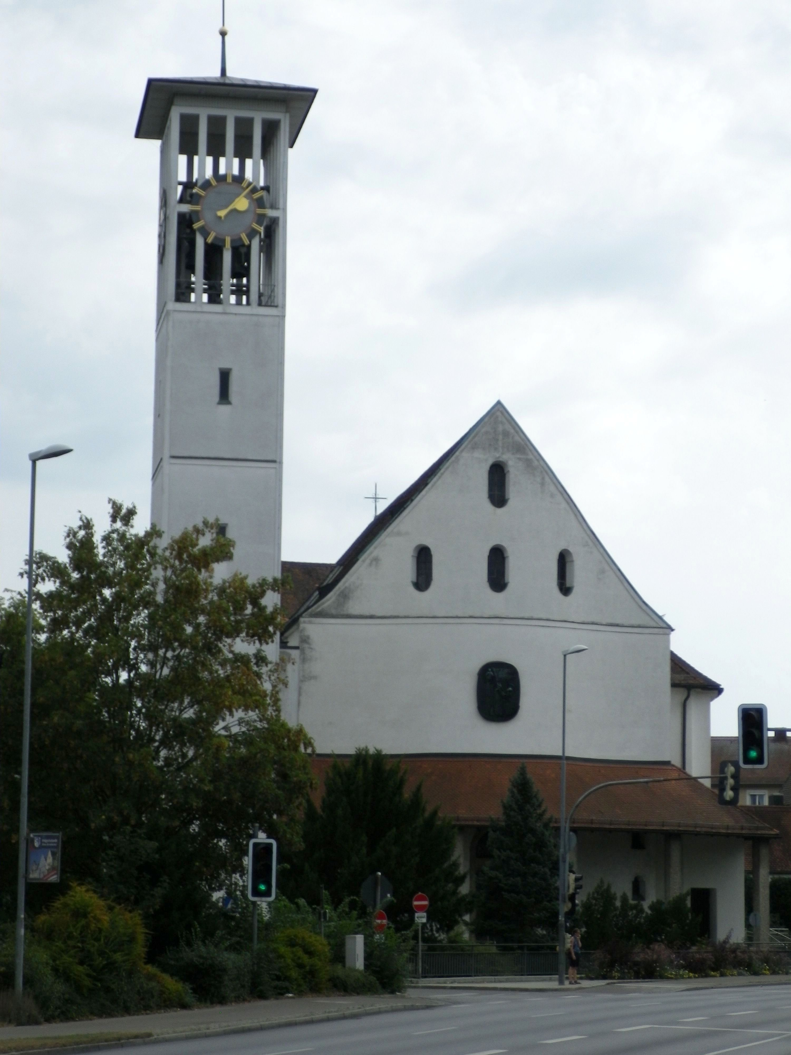 Kirche Sankt Anton